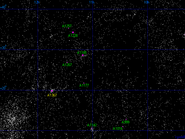 Mappa del Superammasso del Leone